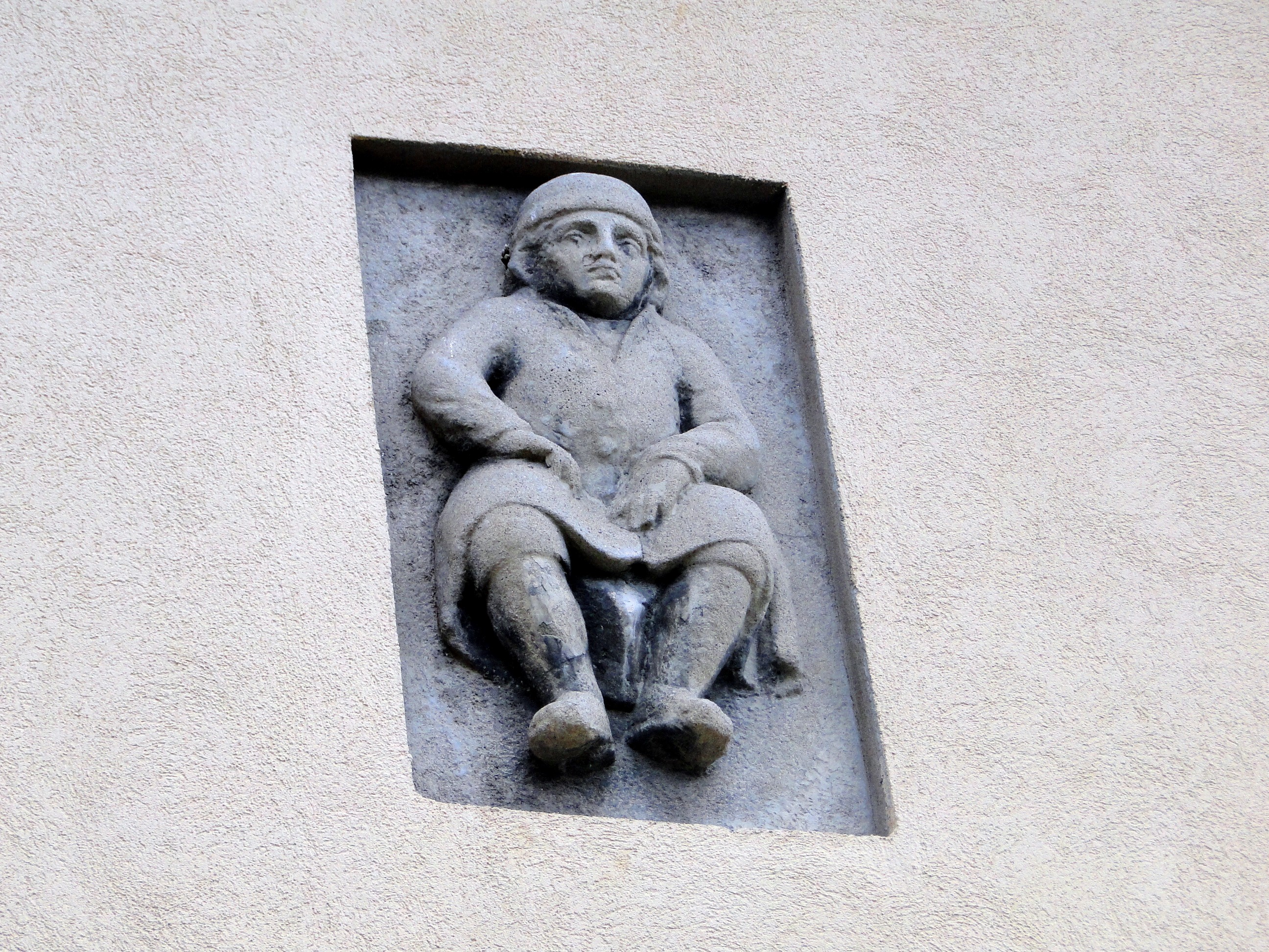 Kopie der Brückenmännchen-Figur am Haus Kotzschweg 12 in Dresden-Loschwitz